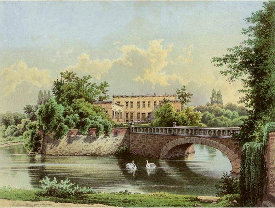 Schloss Angern, Kreis Wolmirstedt